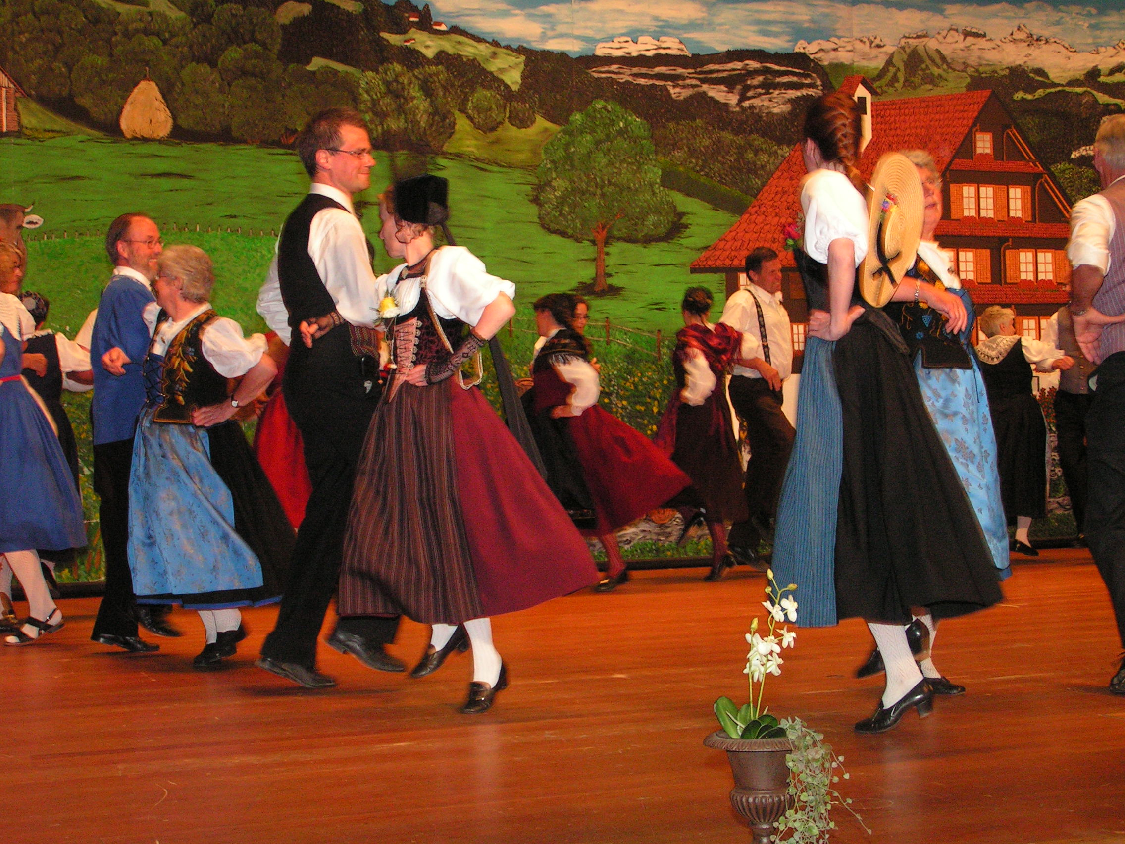 Volkstänzer in verschiedenen Trachten auf Bühne im MythenForum Schwyz